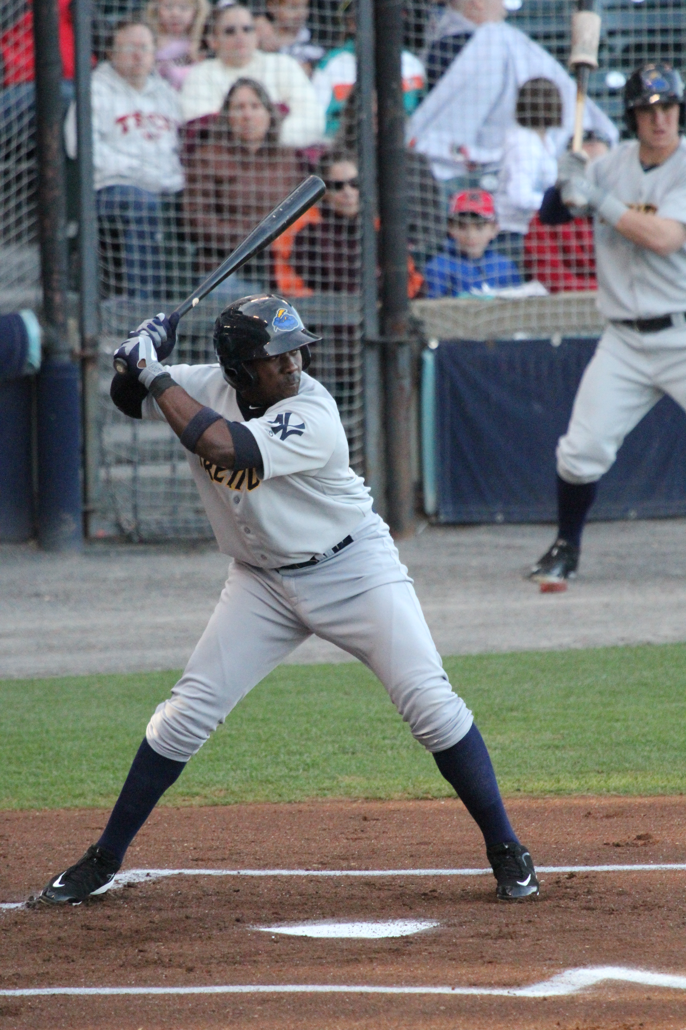 5/3/13 Jose Pirela at bat.